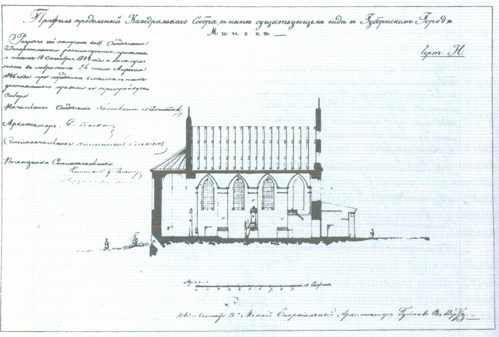 Беларуская (тарашкевіца): Менск (Miensk), рог Высокага Рынку (Vysoki Rynak) і вуліцы Дамініканскай (vulica Daminikanskaja). Царква Сьвятога Духа, абмеры